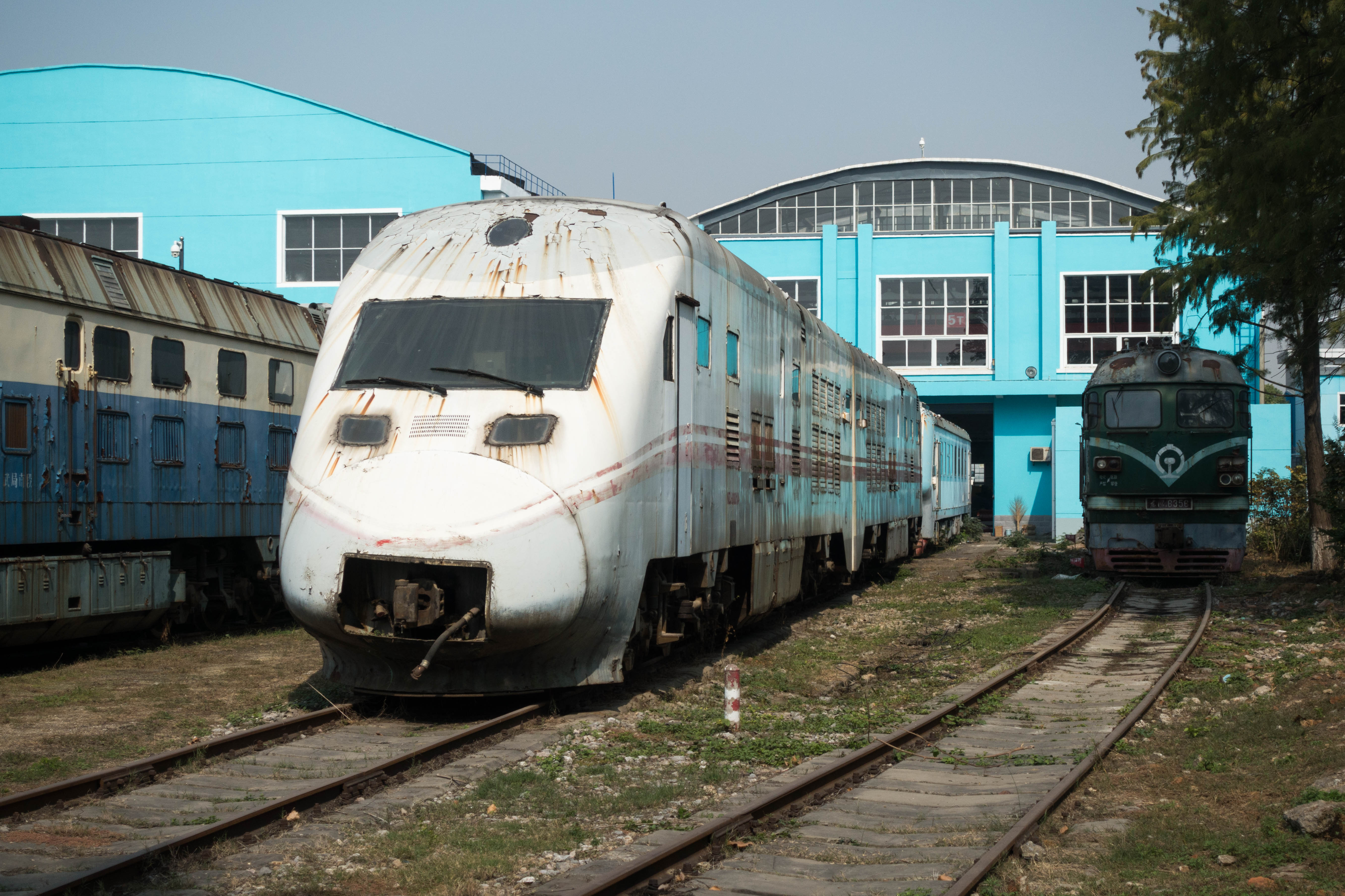 封存于武昌南机务段架修库前的NZJ2神州号动车组机车部分